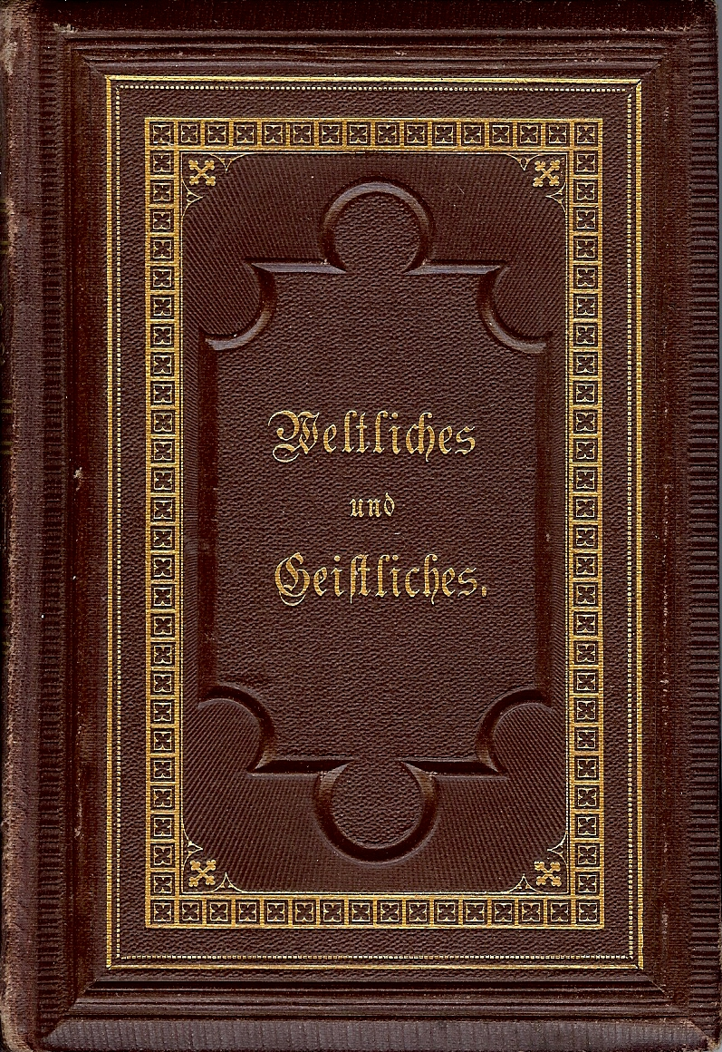 Julius Thikötter - Weltliches und Geistliches in Liedern, Bremen, 1871